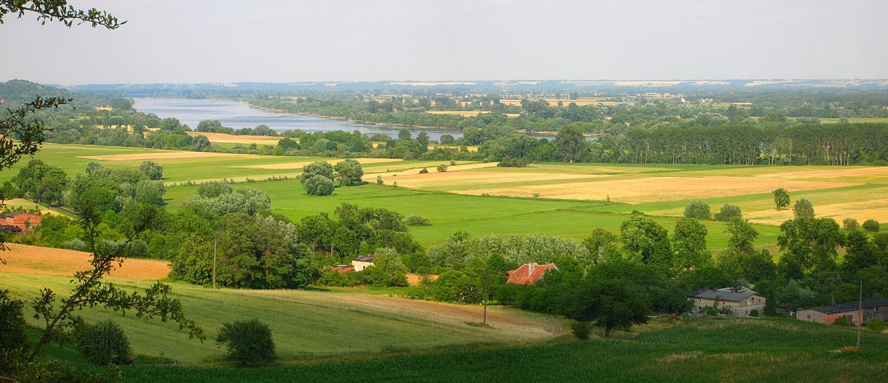 Widok doliny Wisły z grodziska w Strzelcach Dolnych